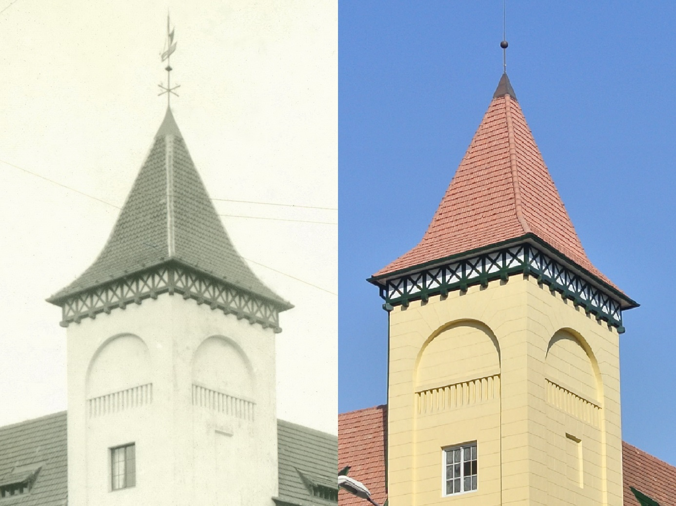 青岛水师饭店塔楼原貌&整修后对比